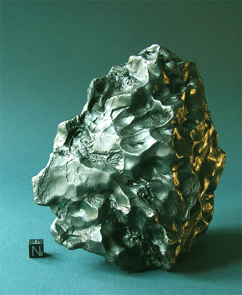 5.1kg Sikhote Aline iron meteorite